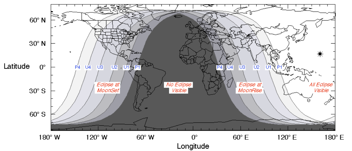 visibilidad eclipse enero 31 de 2018